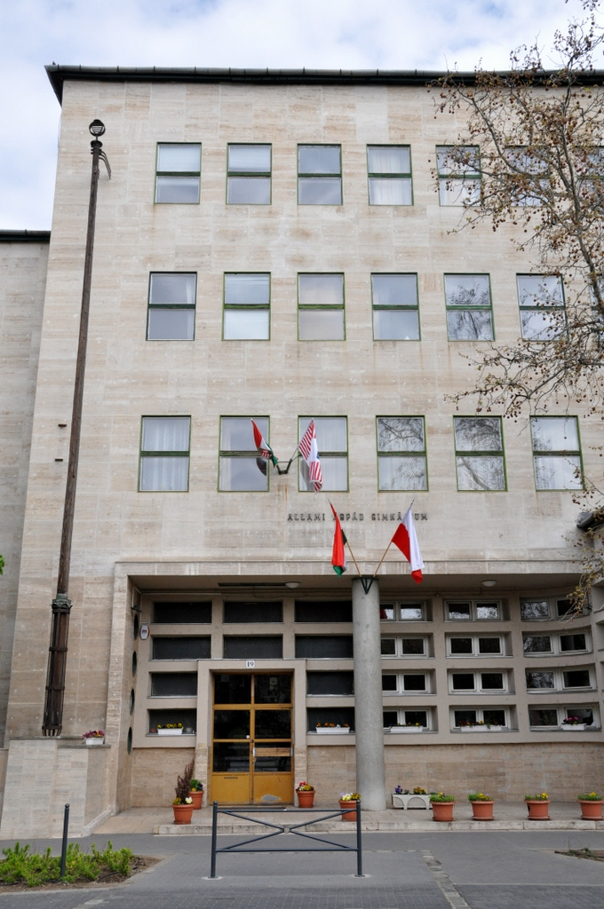 Árpád Gimnázium, Budapest